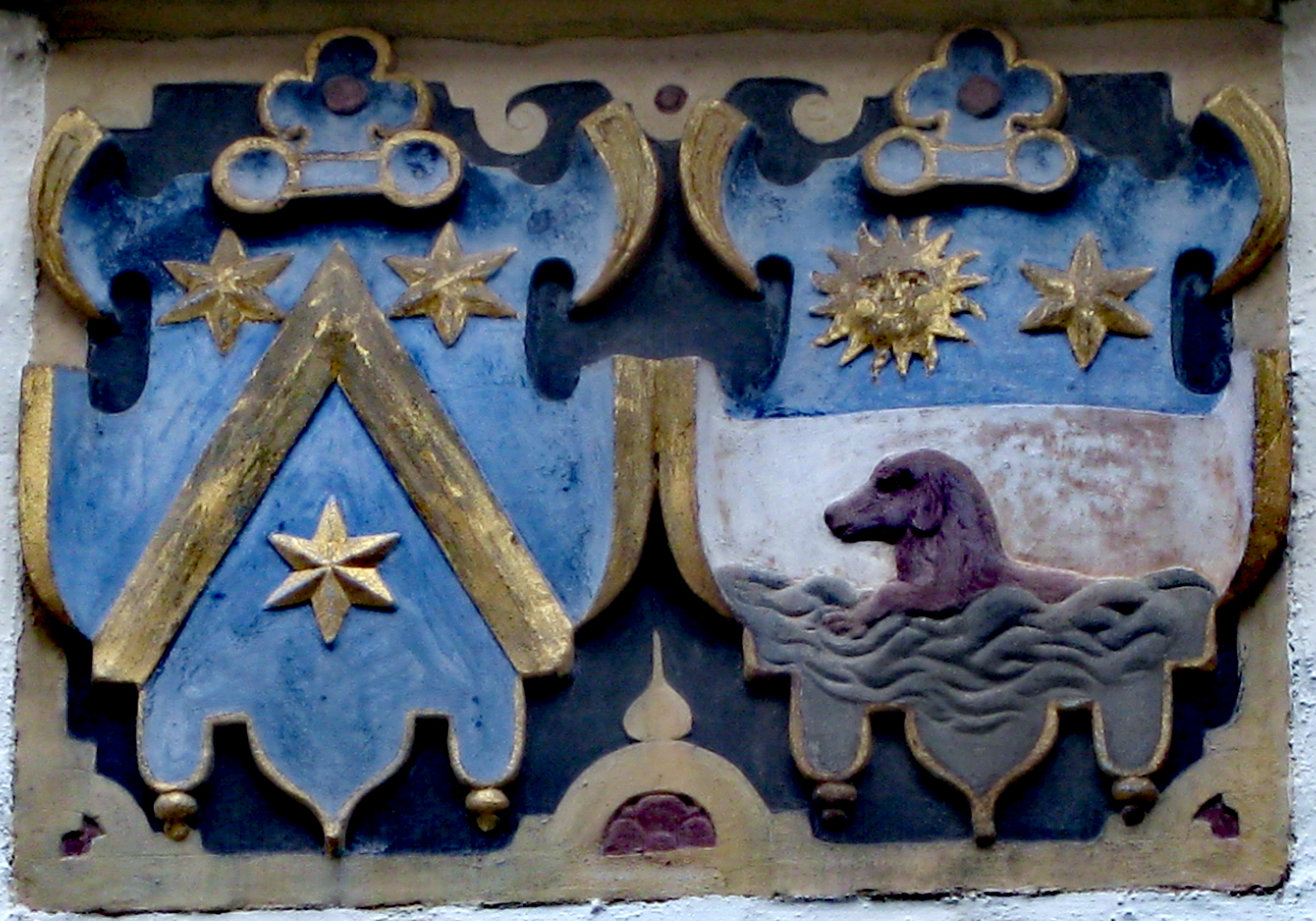 Detail: Allianzwappen des Stifterehepaares Glandorp im Glandorphof an den einzelnen Wohnbuden.